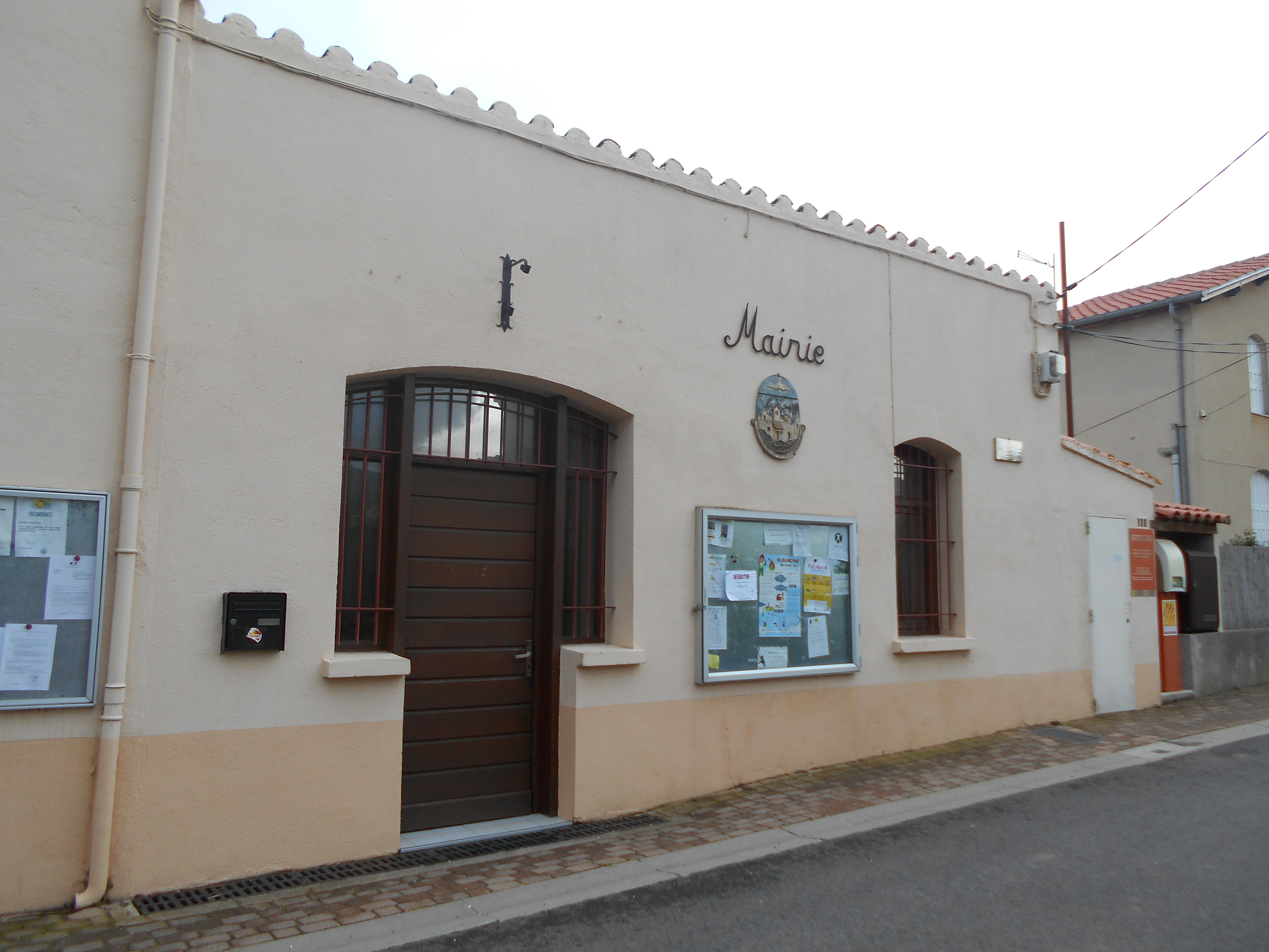 Casa del Comú d'Espirà de Conflent